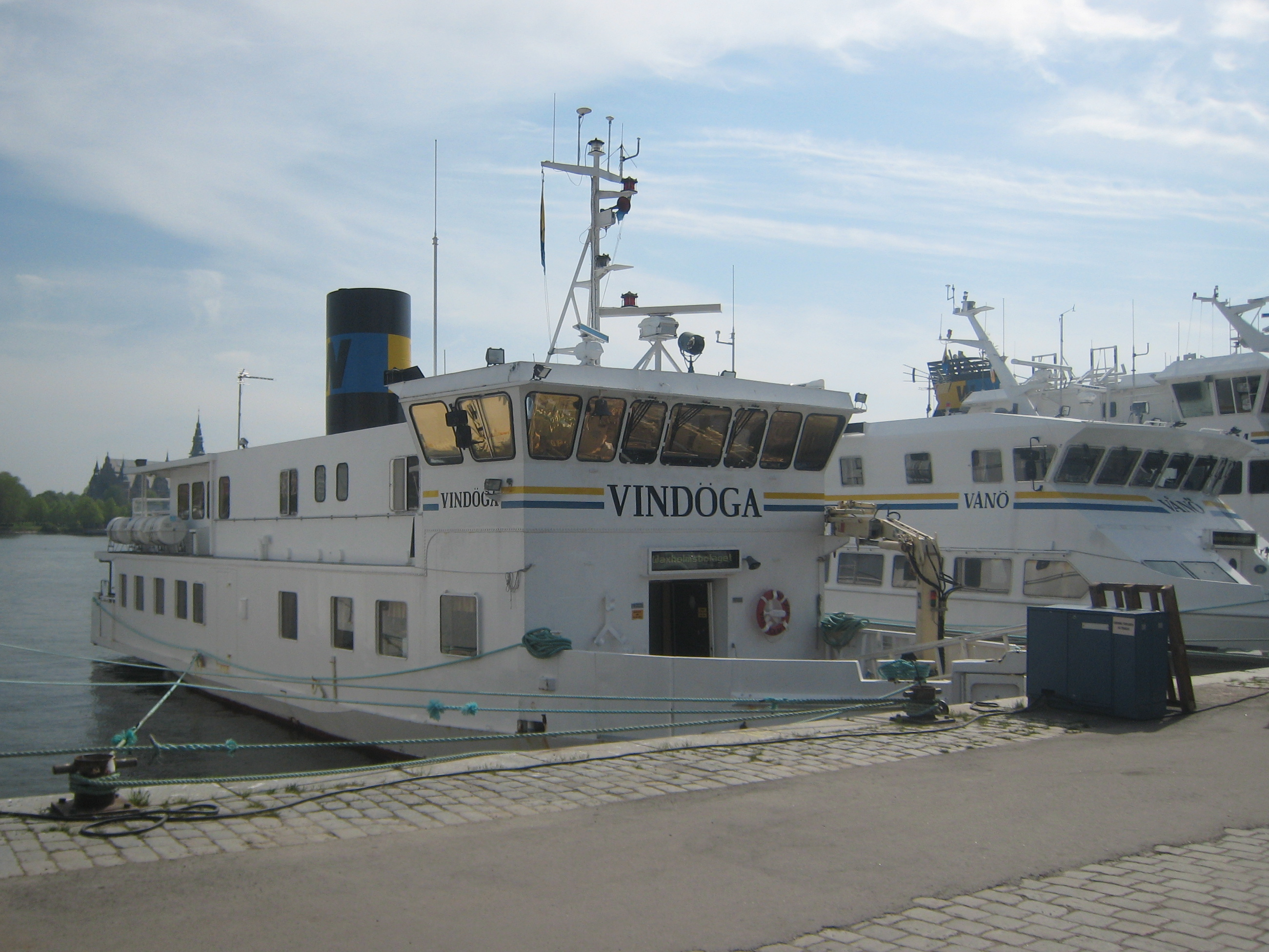 M/S Vindöga i maj 2010.